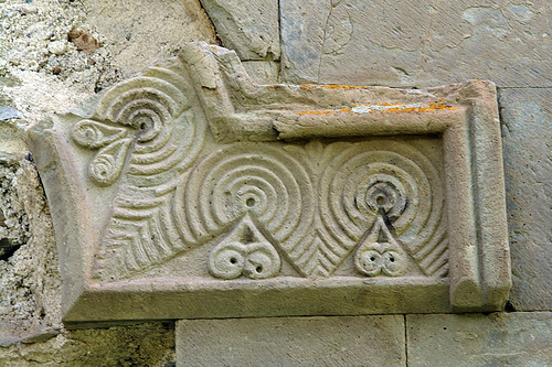 Tbeti in Tao-Klarjeti